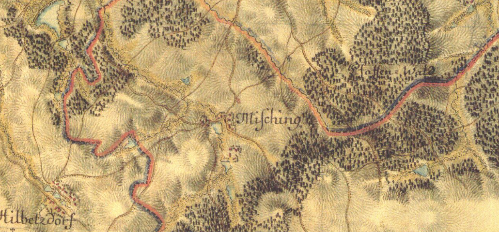 Měšín (okres Jihlava) a jeho okolí - I. vojenské mapování – josefské (1764–1768, 1780–1783).